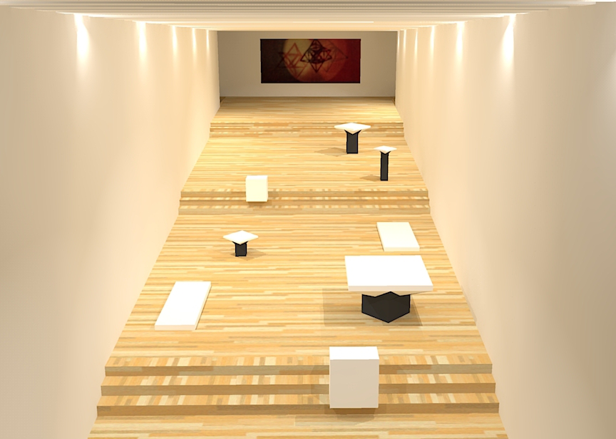 Vista dall'alto dell'allestimento della grande rampa presente all'interno della mostra internazionale di architettura moderne alla XI edizione della Triennale di Milano(modello sketchup)